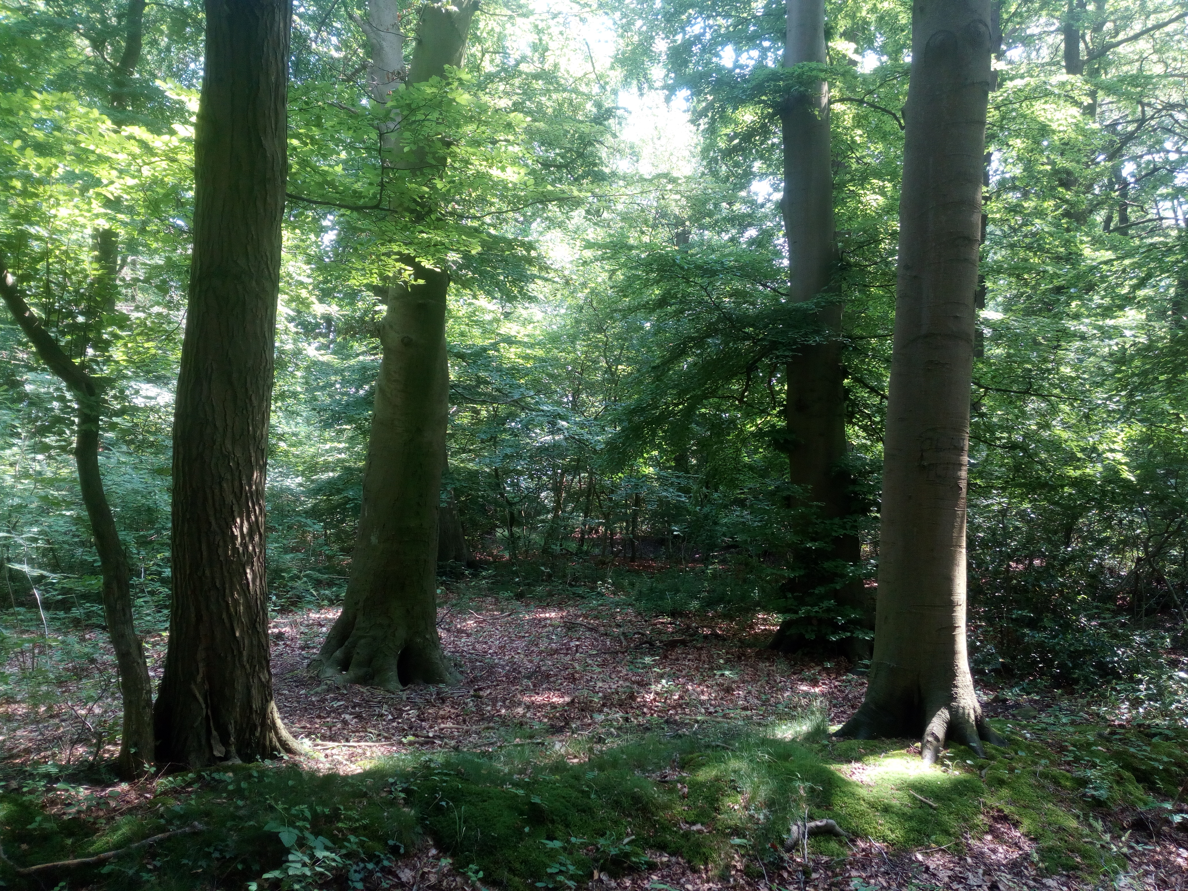 Ein kleines Waldgebiet in Westerhausen Gelbe Riede mit einer Bank und einem Teich im Wald. Klein, fein und naturbelassen, etwas außerhalb gelegen.